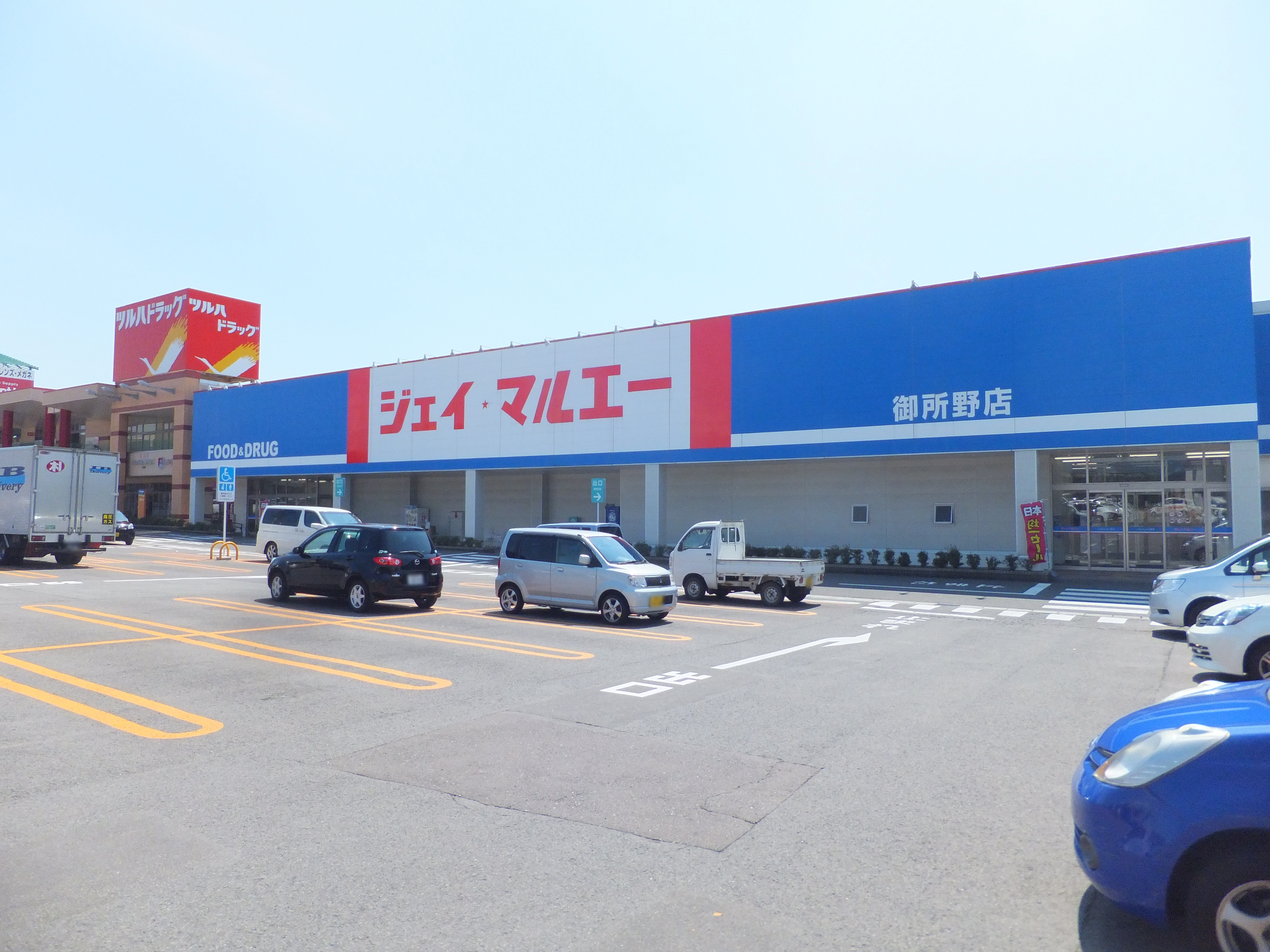 フレスポ御所野内、ジェイ・マルエー御所野店（秋田市御所野元町）